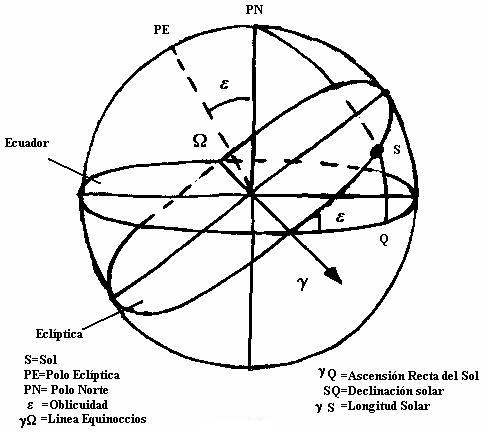 Esta imagen está hecha por la persona que la subió y cedida a Wikipedia.